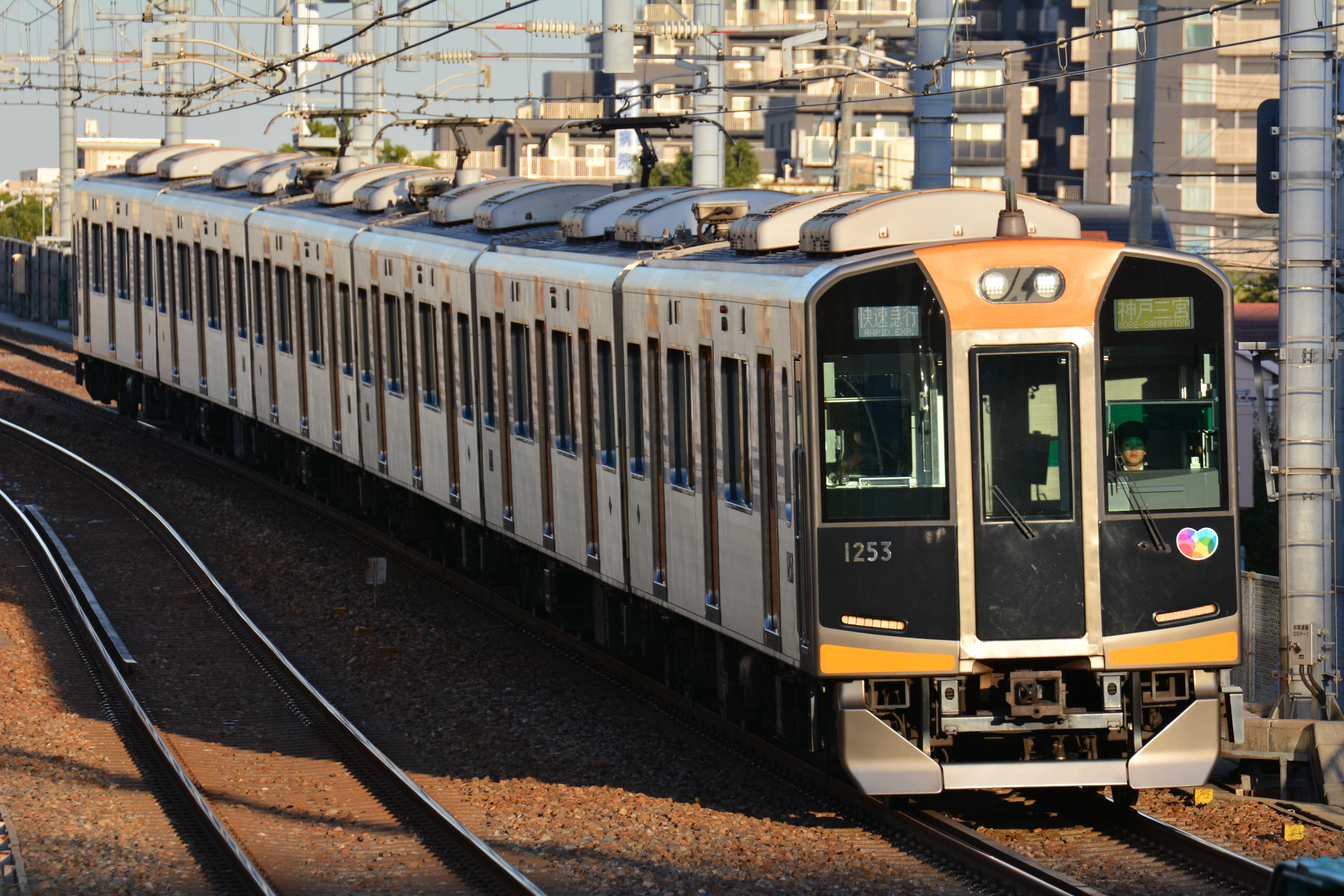 阪神1000系1203F